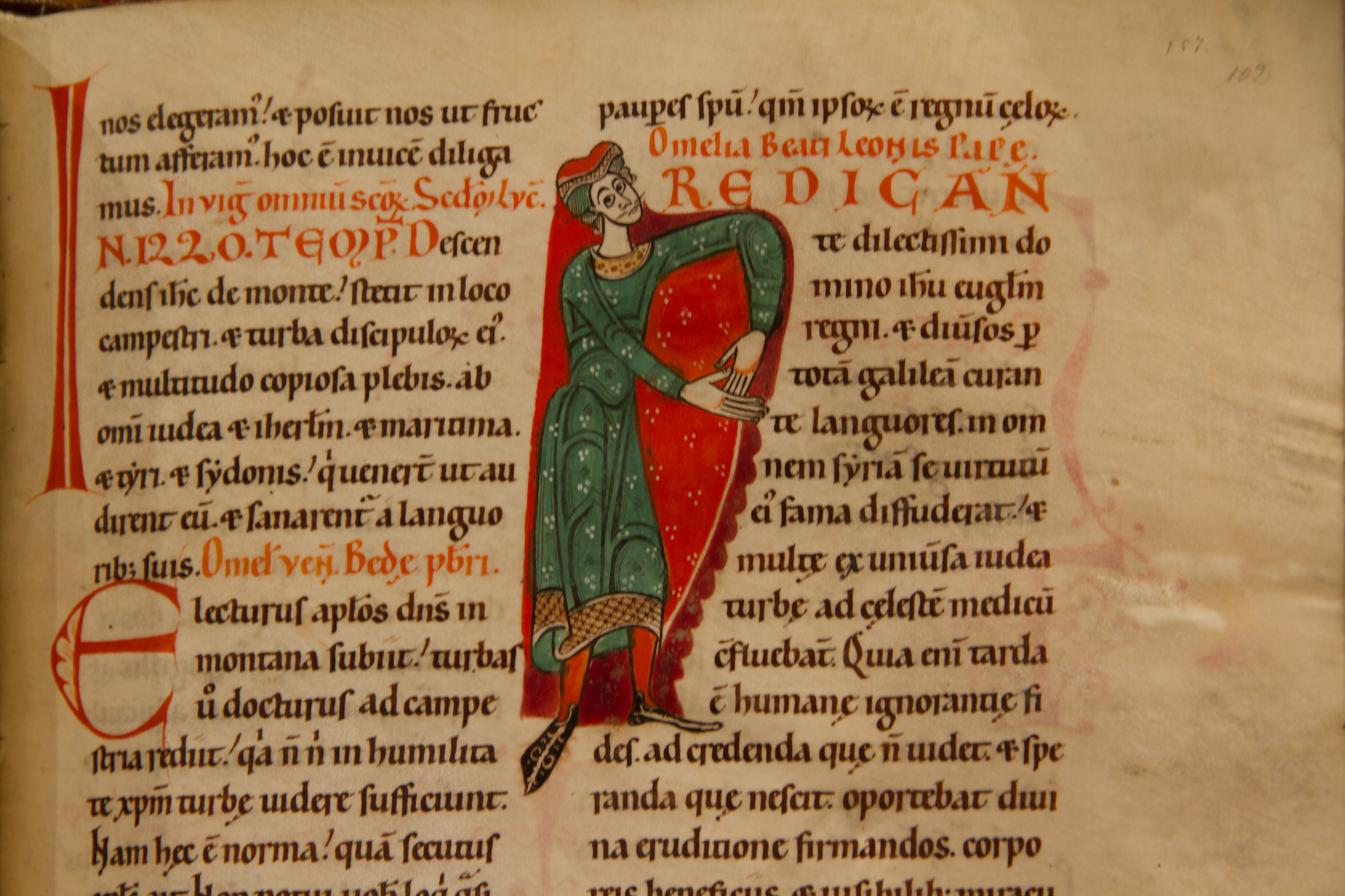 Codex Guta-Sintram, 1154